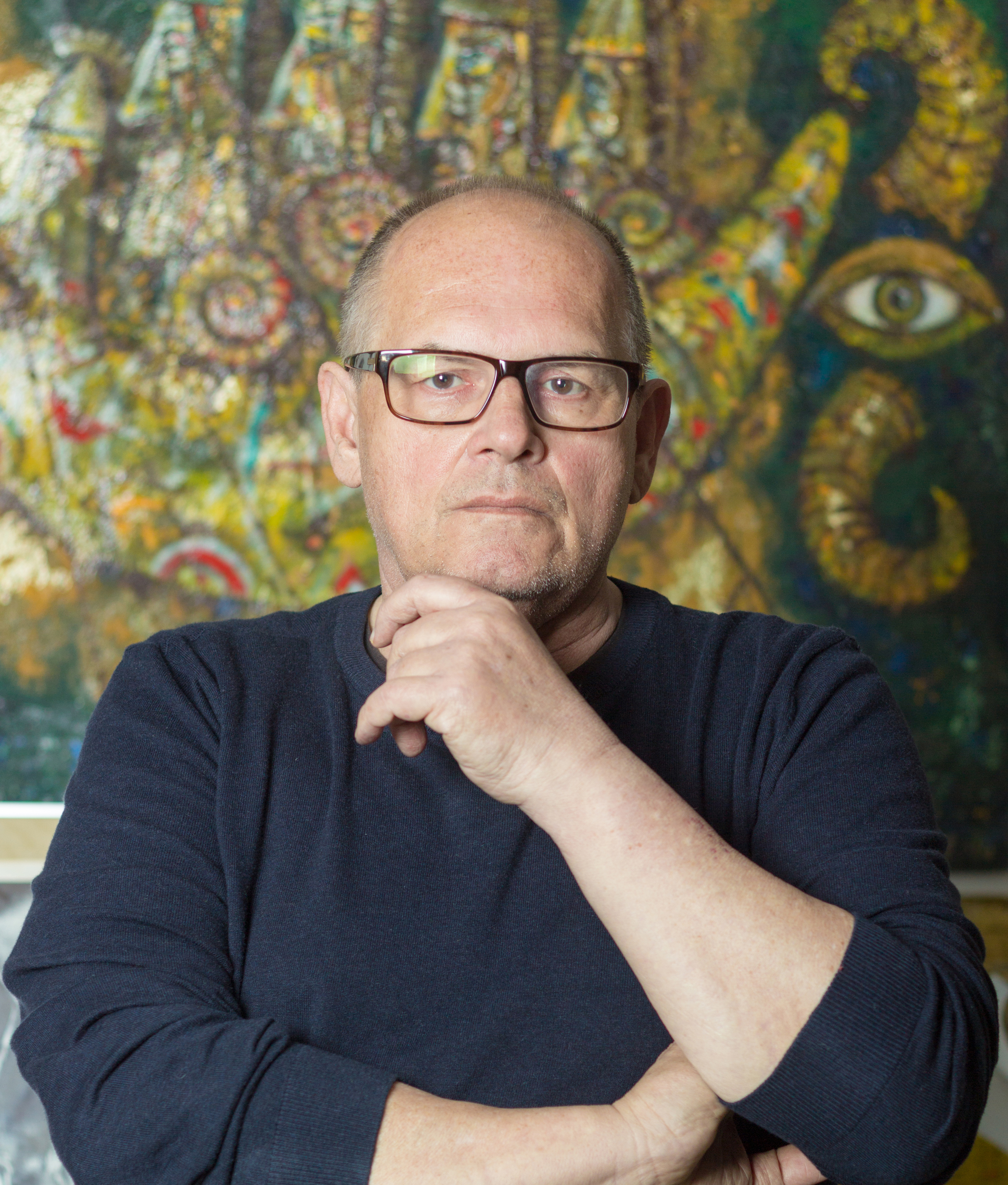 Jiří Neuwirt (* 27. února 1948 Ostrava) je český malíř, grafik a ilustrátor.